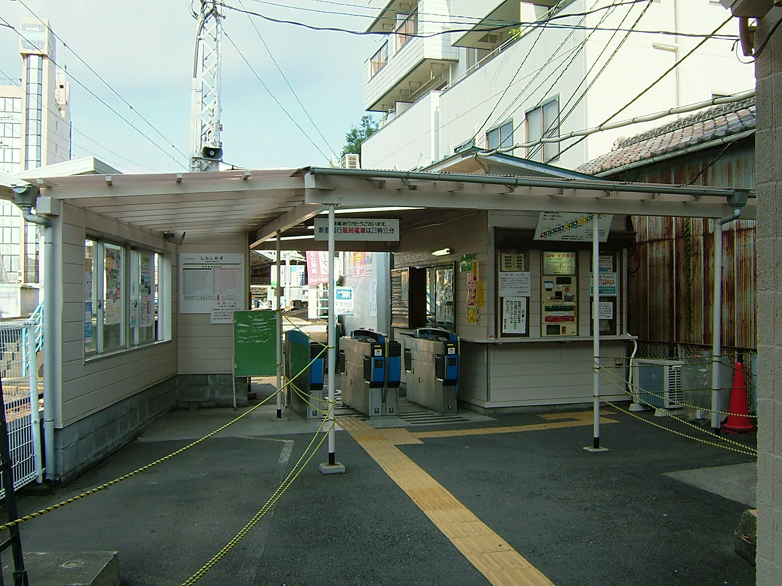 静岡鉄道 新清水駅(巴町口)